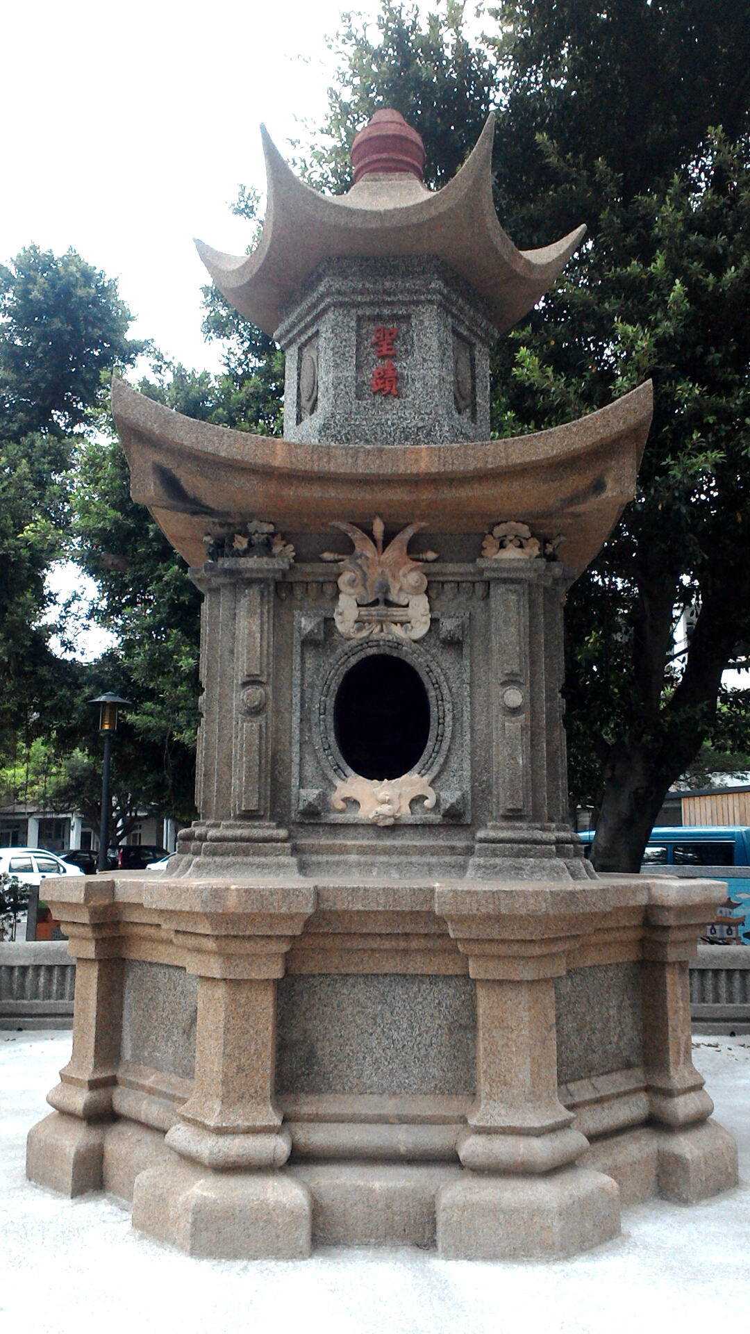 中壢聖蹟亭,桃園市中壢區新街里